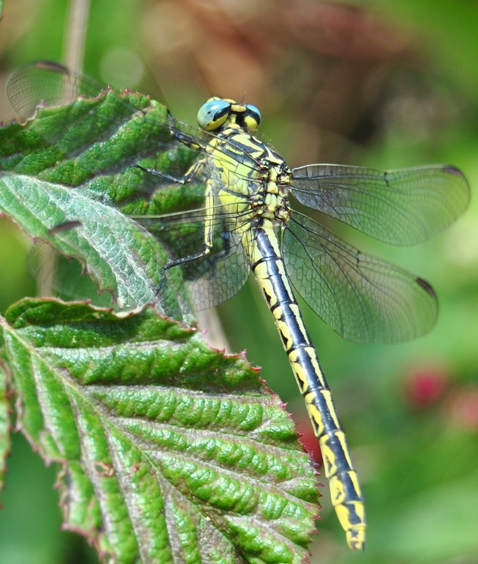 Hembra adulta de Gomphus graslinii.